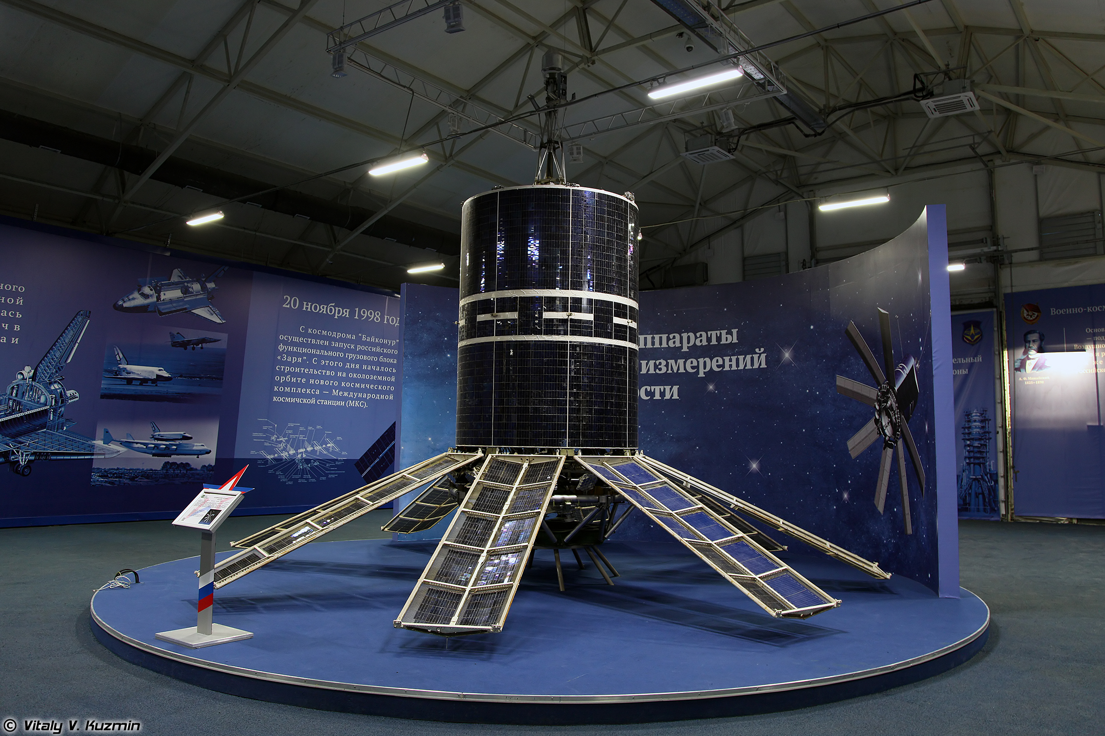 Космический аппарат ГЕО-ИК (GEO-IK spacecraft)